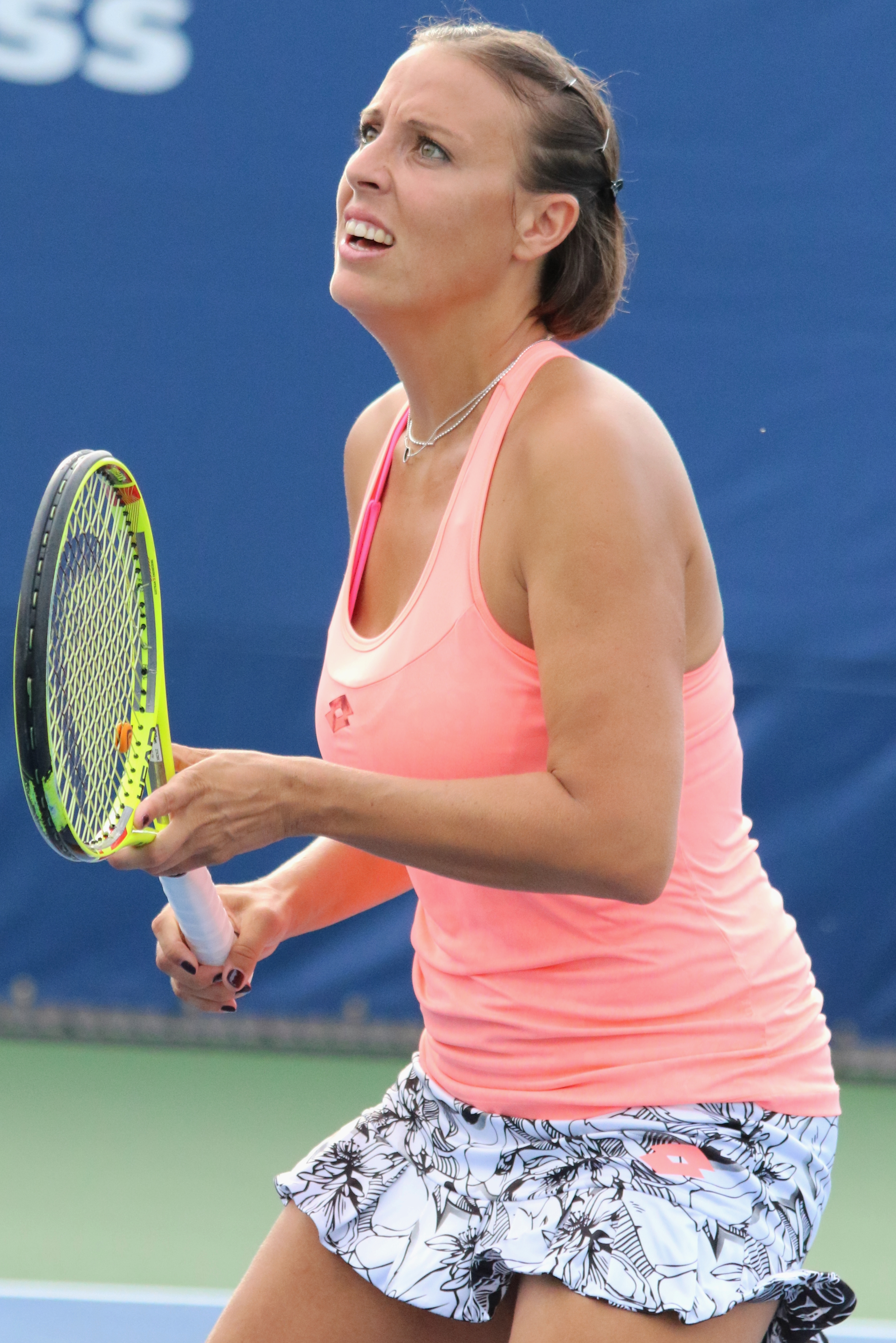 Klepac US16 (3)